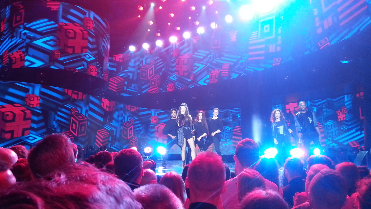 Polska piosenkarka Lanberry podczas występu w krajowych eliminacji do 62. Konkursu Piosenki Eurowizji.